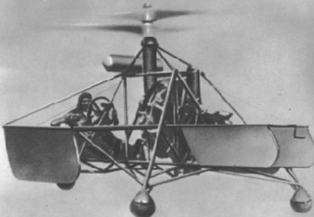 Asbóth Oszkár tervezte AH-4 helikopter bemutató repülésen Vígh Mihály pilótával az angol Ministry bizottsága előtt.